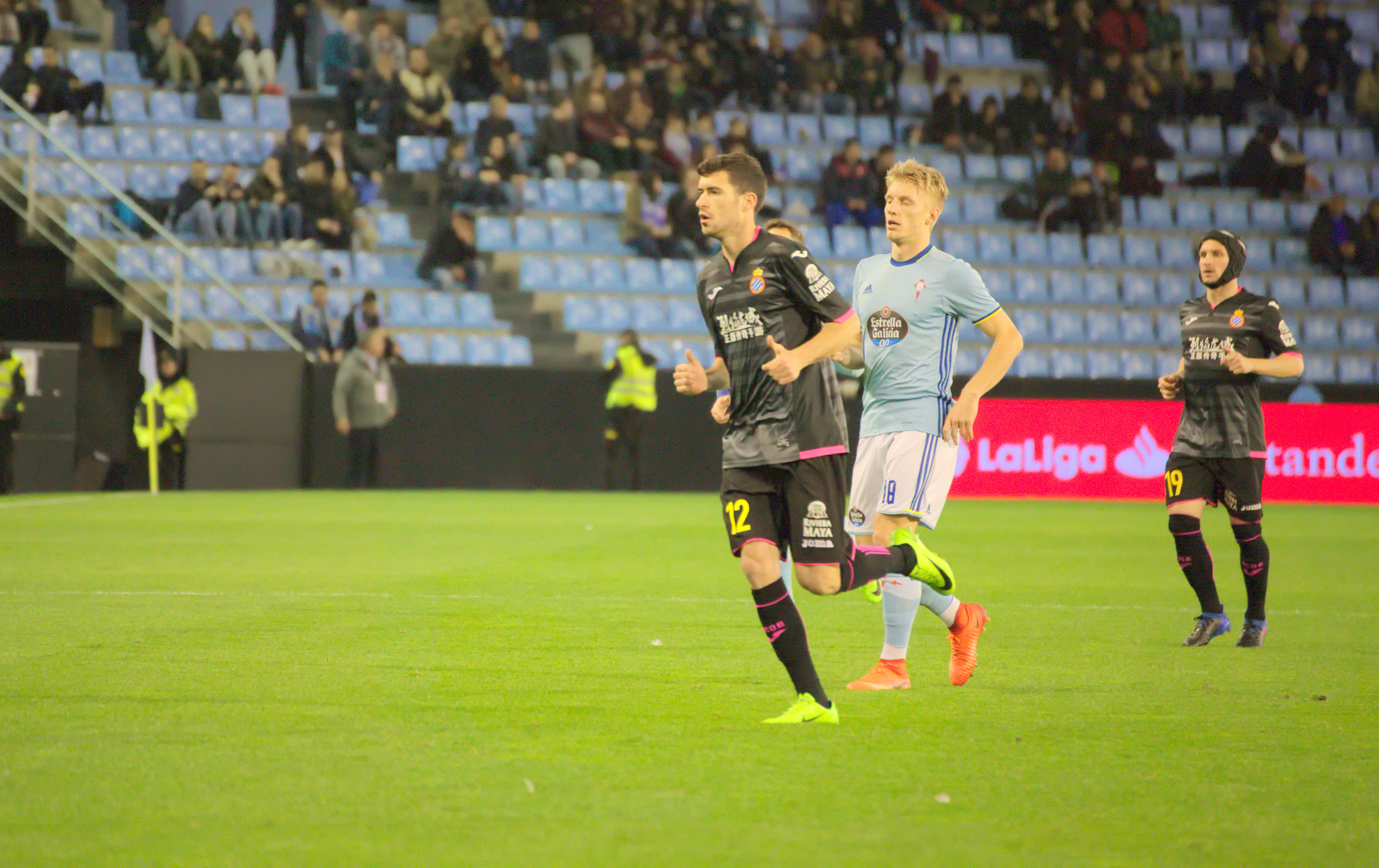 Aáron - Espanyol